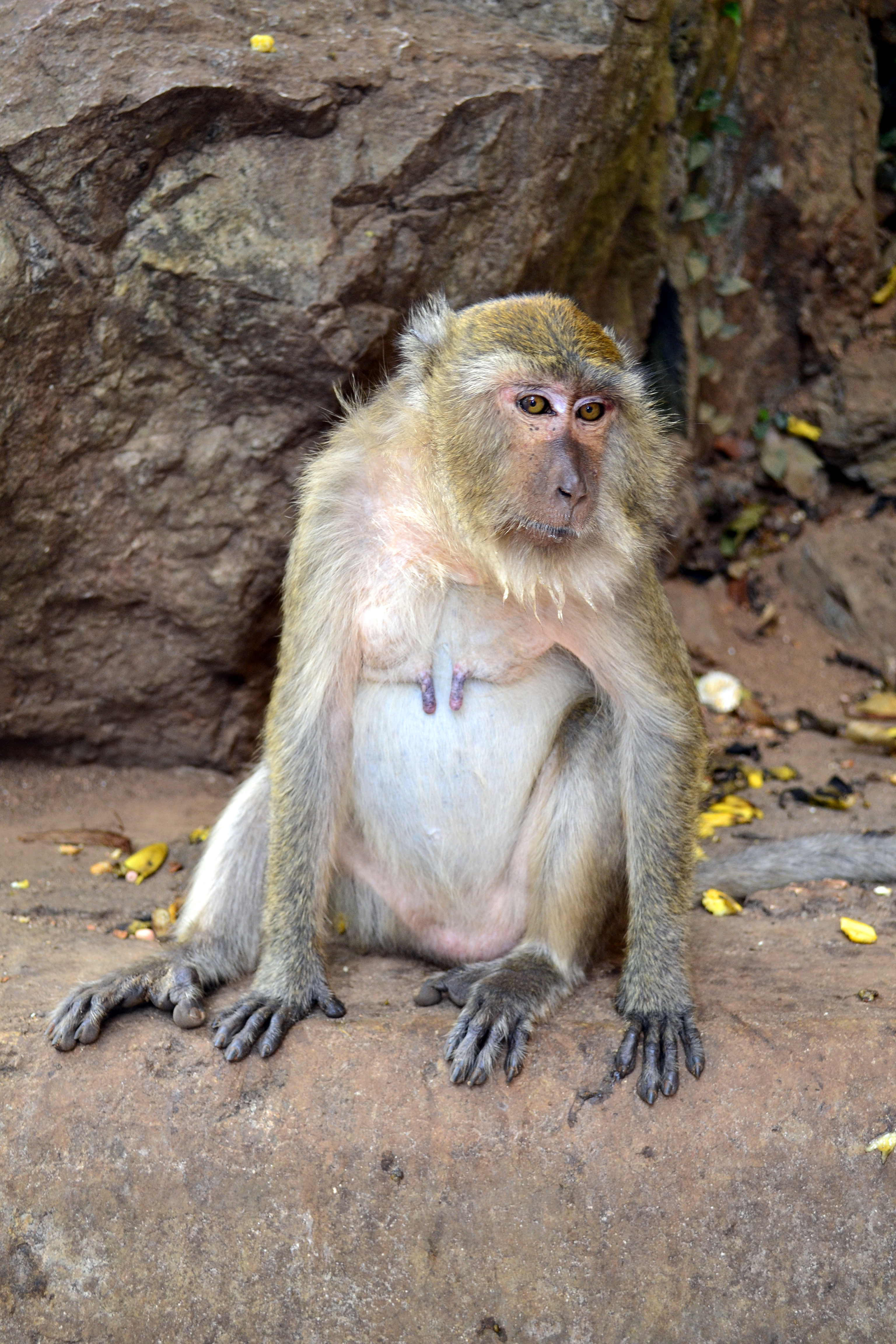 Affe am Wat Suwan Kuha